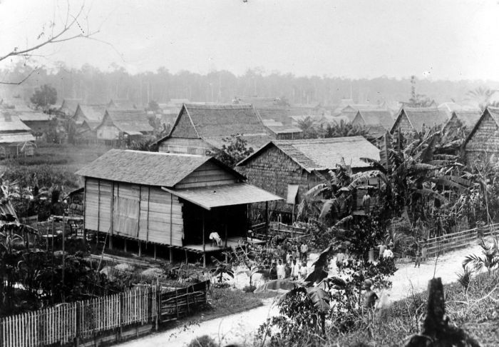 Repronegatief. Gezicht over Pangkalanboeoen